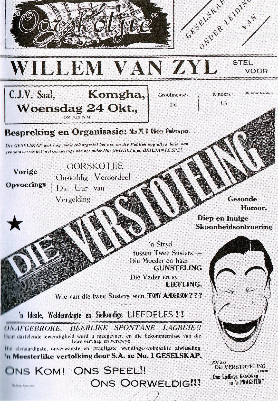 Die Oorskotjie-geselskap, onder leiding van Willem van Zyl, stel voor: Die Verstoteling. 'n Stryd tussen Twee Susters - Die Moeder en haar Gunsteling, die Vader en sy Liefling. Wie van die twee Susters wen Tony Anderson?